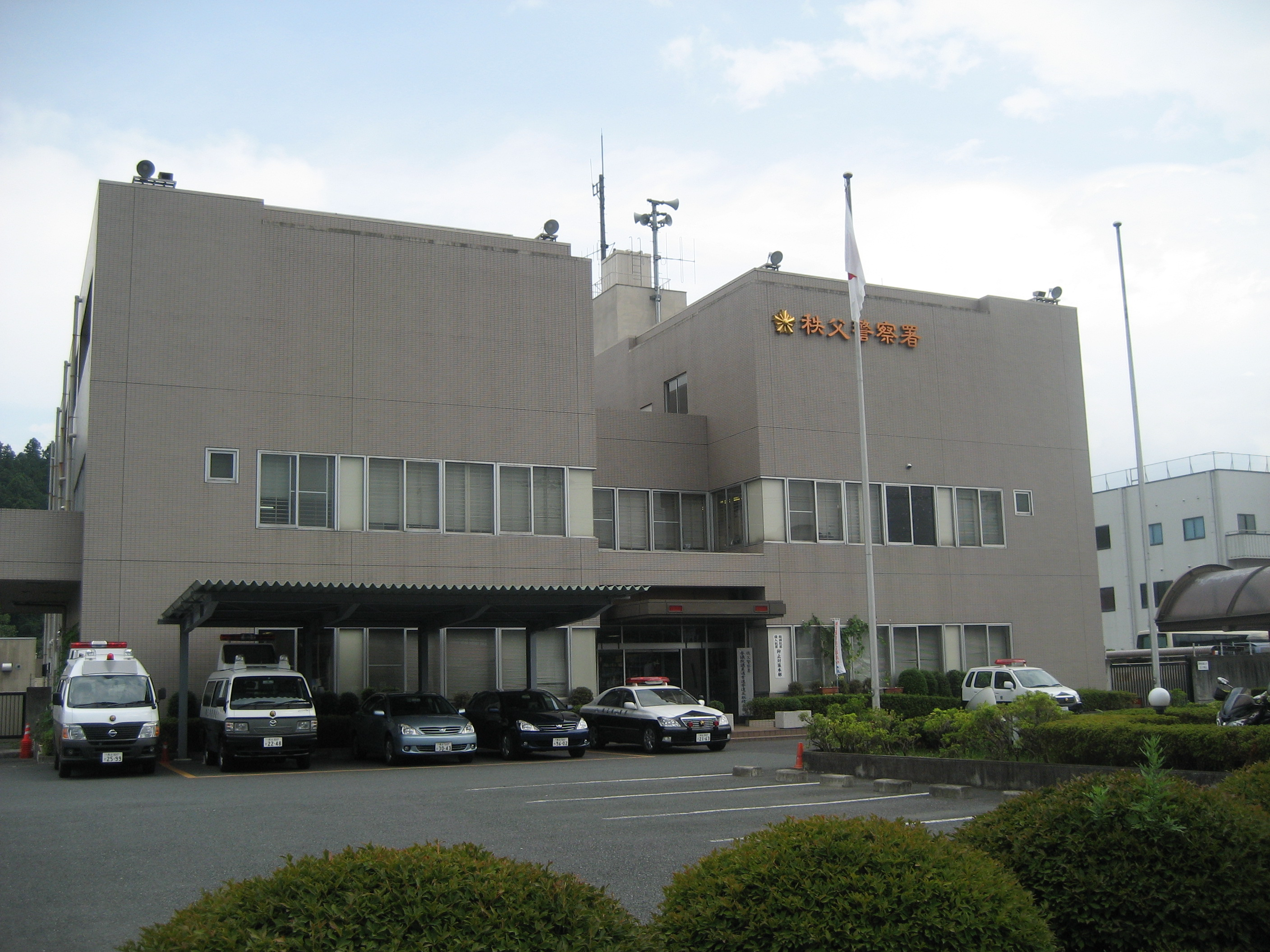 埼玉県秩父警察署庁舎